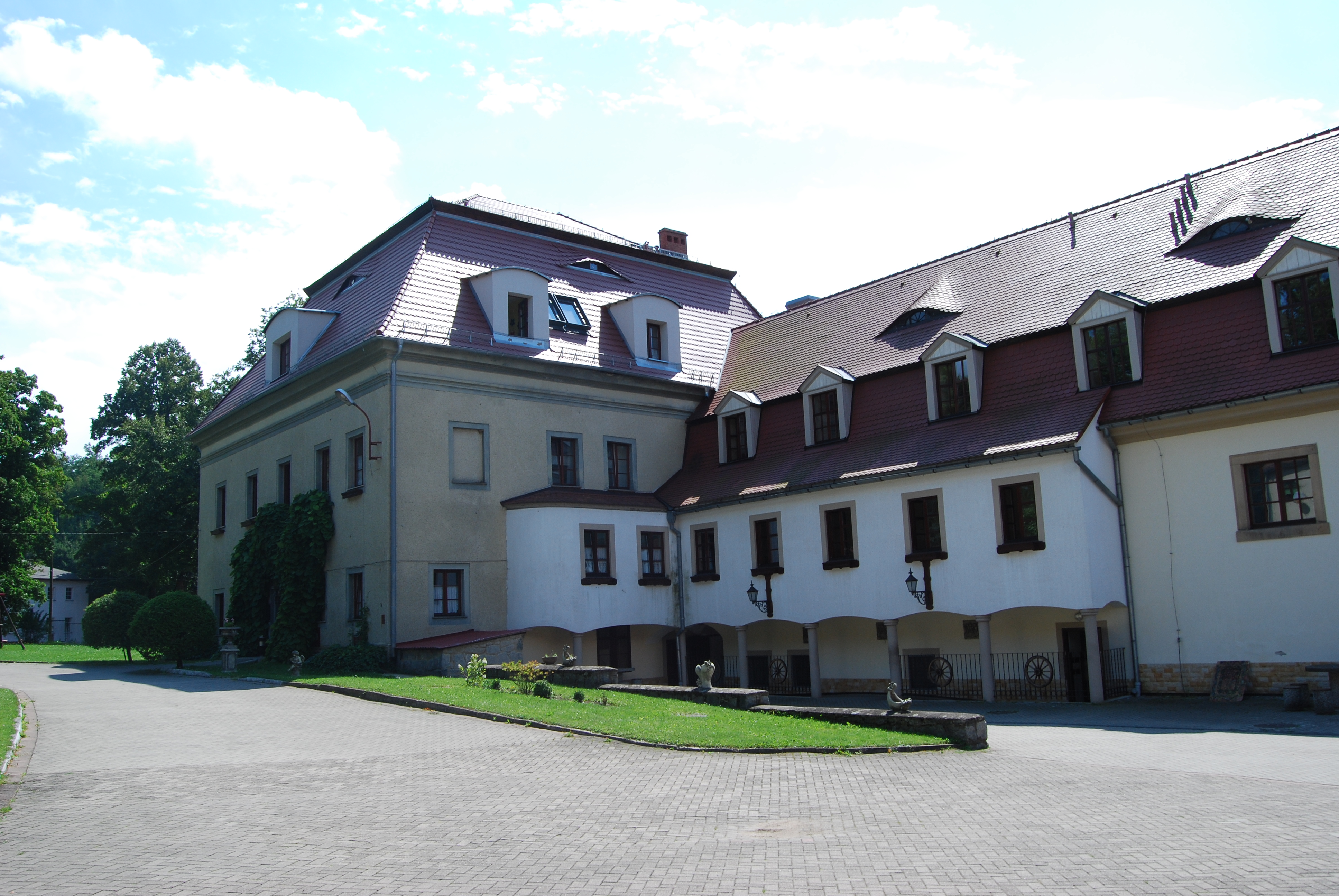 Zespół pałacowo-folwarczny:-Spichlerz z basztą i budynkiem bramnym,-Dom mieszkalny-Stajnia, ob. kuchnia i stołówka-Wozownia z drewutnią, ob. dom mieszkalny-Rządcówka, ob. budynek administracyjny-Brama z fragmentem muru ogrodzeniowego Janowice Wielkie, ul. Chłopska 1, Janowice Wielkie